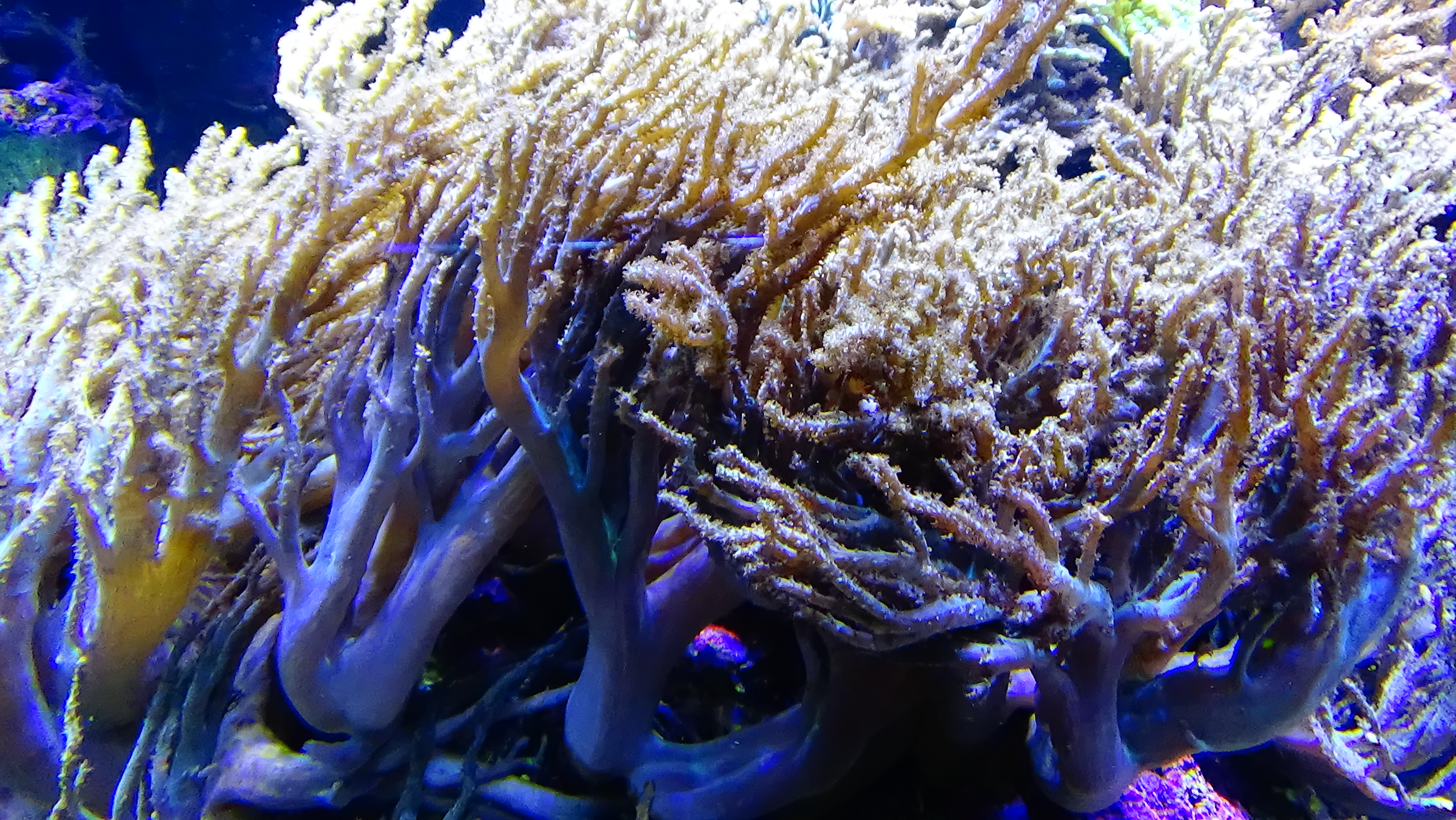 Litophyton arboreum - corail brocoli - Aquarium de la Porte Dorée - 11/2014